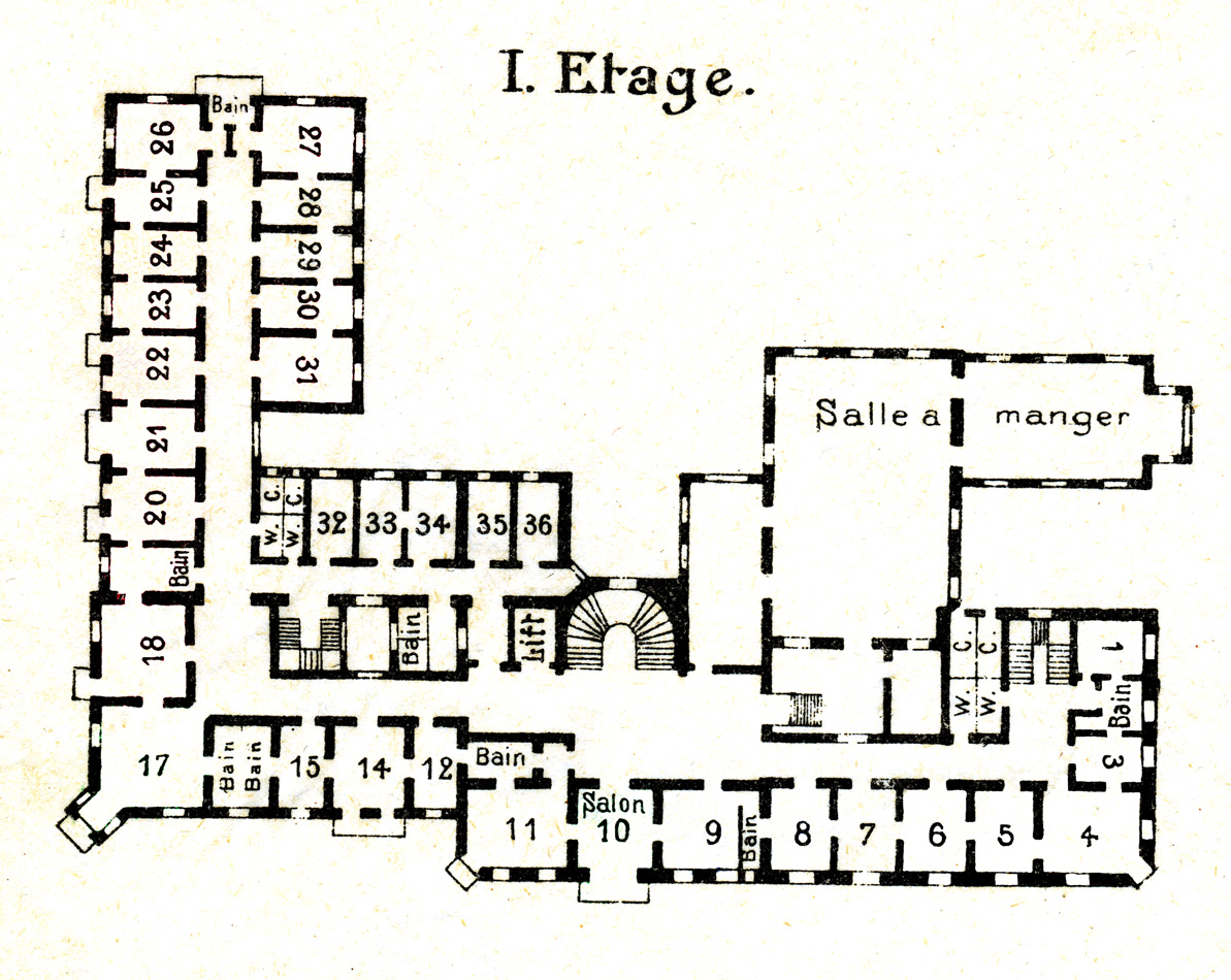 Hotel Pontresina, Grundriss 1. Etage